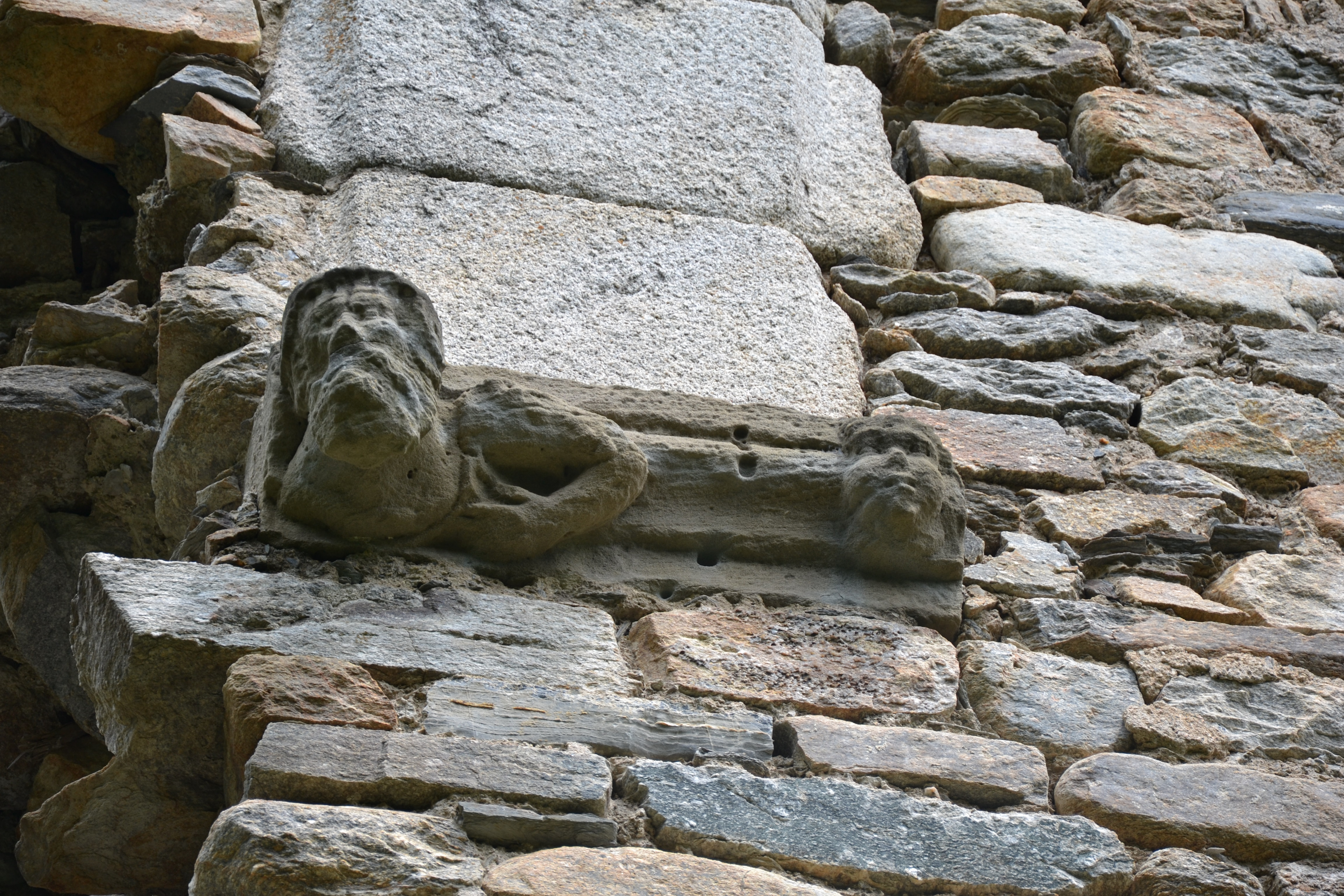 Tête de vieillard et tête d'enfant